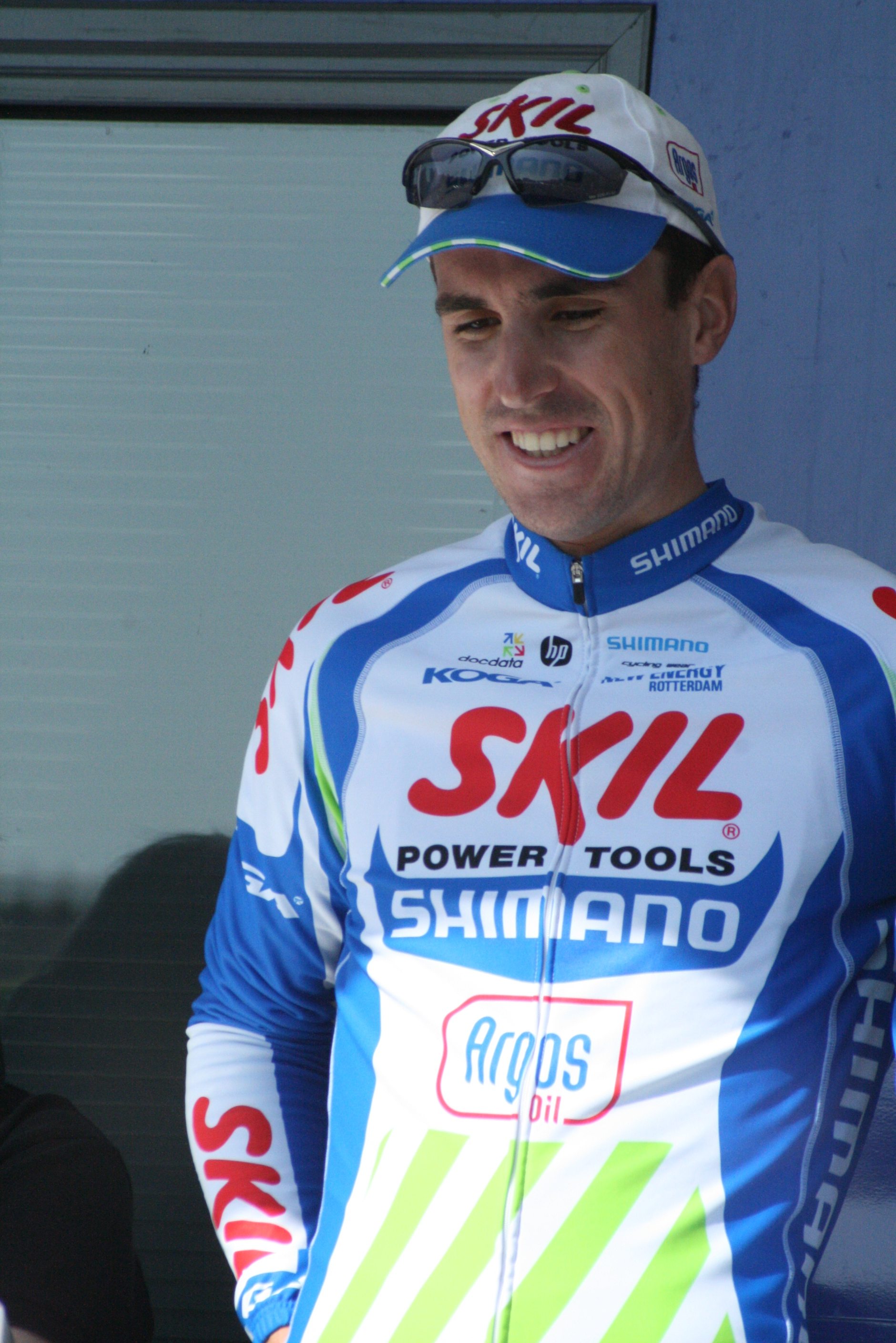 Présentation des coureurs au départ de la première étape Matthieu Sprick